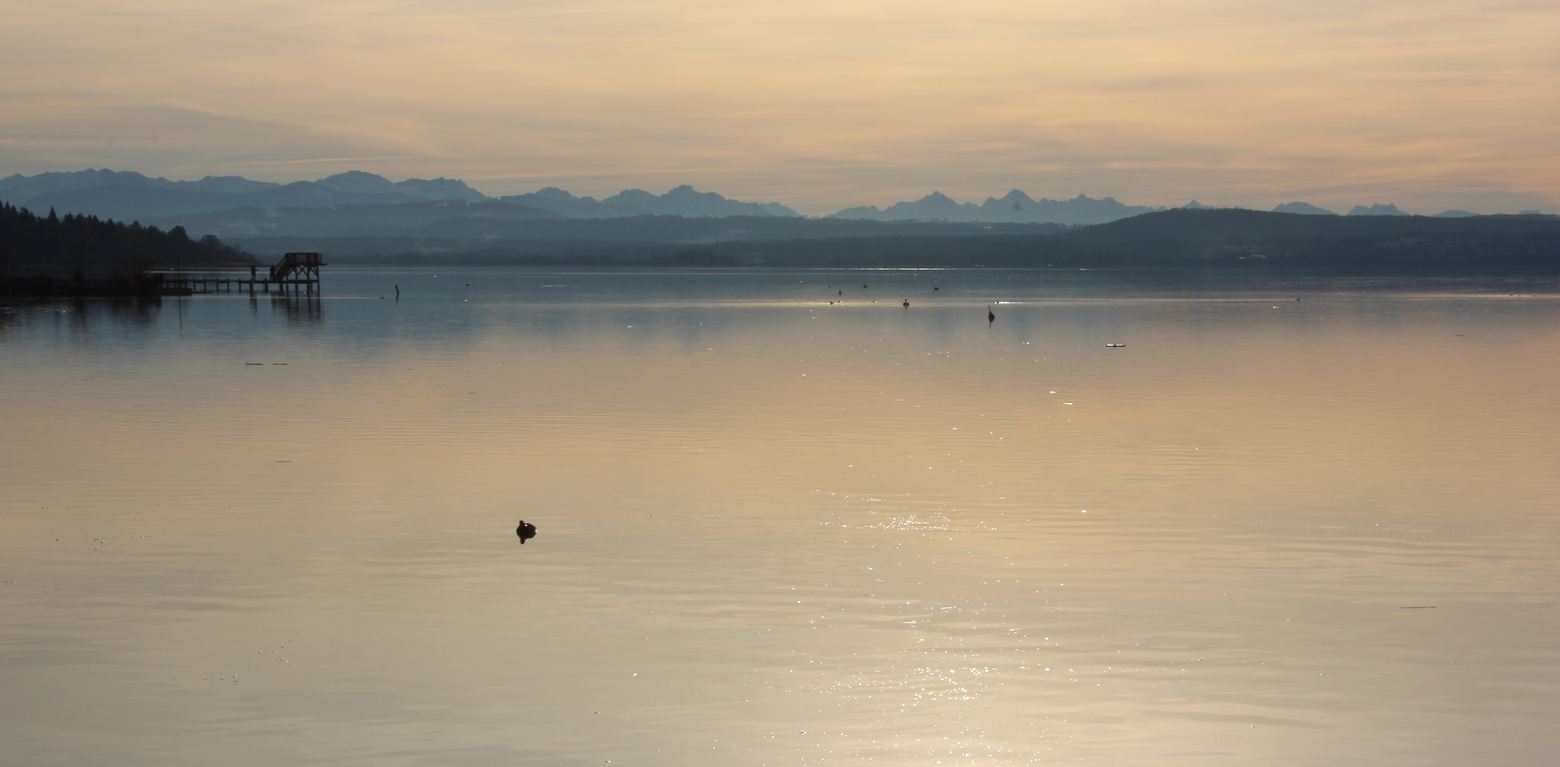 Ammersee im Winter